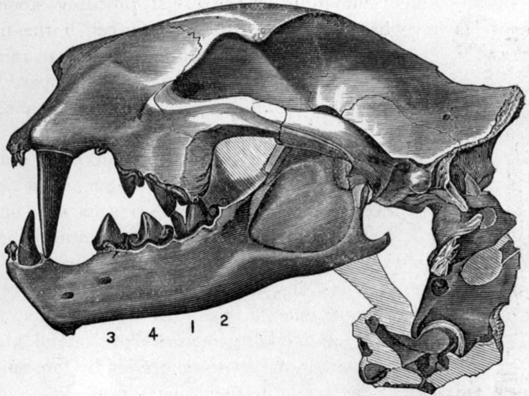 Skull of Nimravus gomphodus.